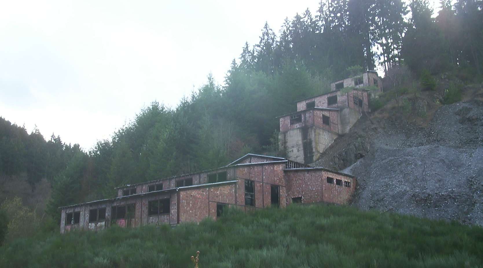 Ruinen der Erzwäsche der Grube Barbarasegen im Altlayer Bachtal